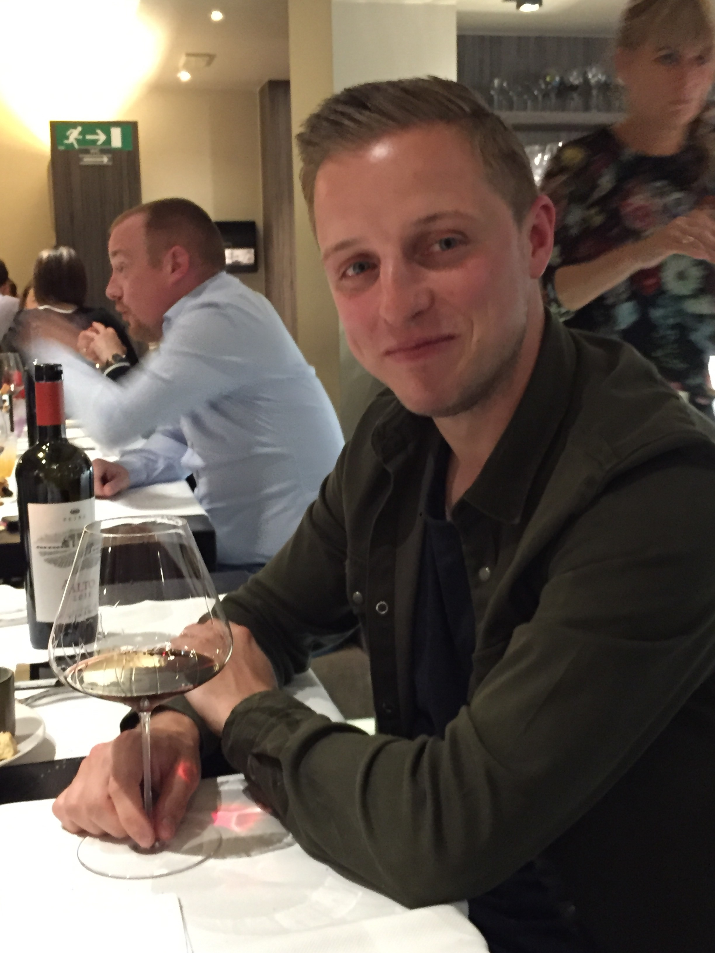 Maxim Geurden